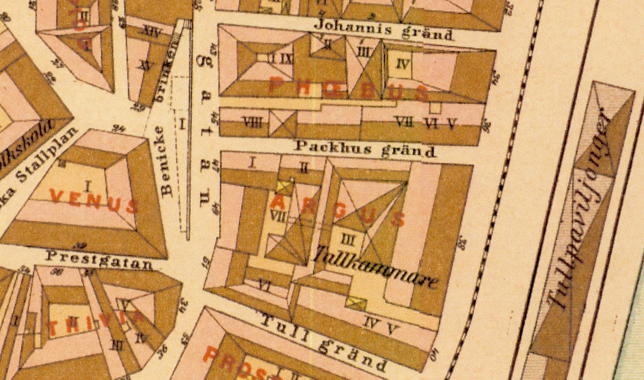 Gamla stan: kvarteren Phoebus, Argus, Venus